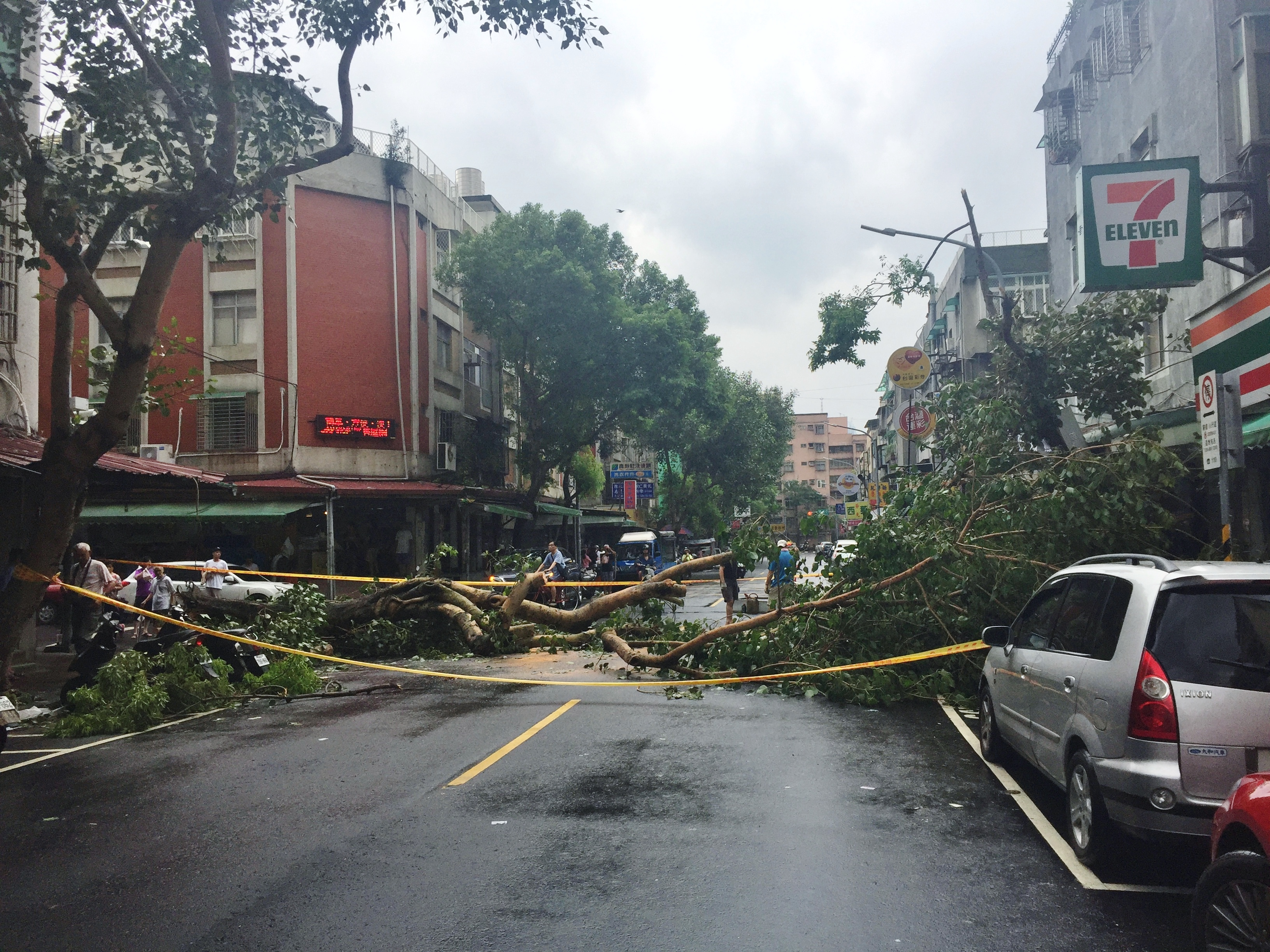 梅姬颱風過後，臺北市松山區新東街與新東街16巷口的菩提樹往西倒下，遮斷新東街南北交通。